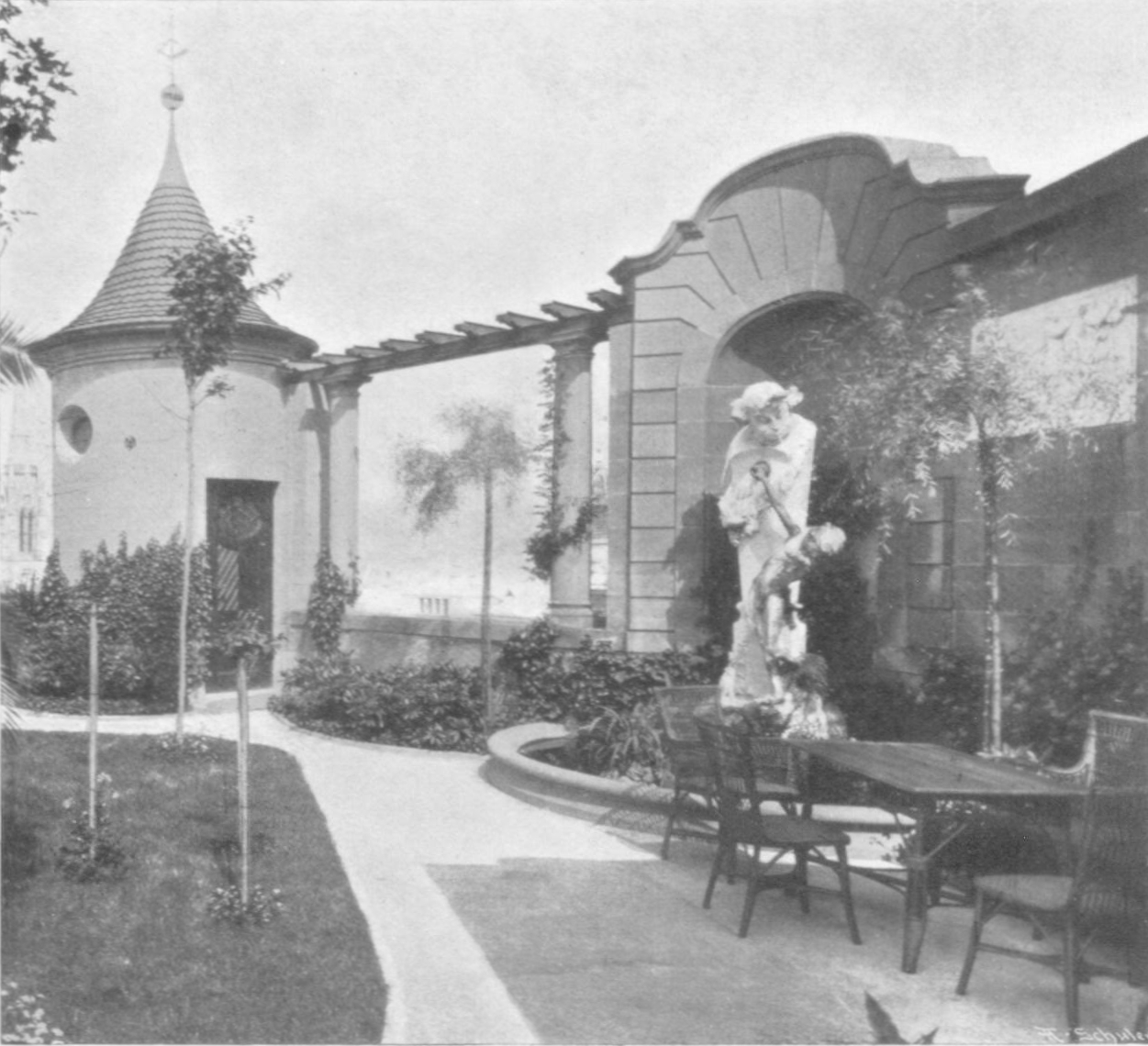 Dachgarten der Volksbibliothek in der Silberburgstraße 191 in Stuttgart, Foto: 1902.